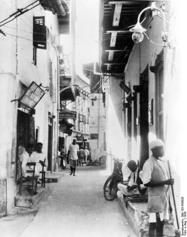 ADN-ZB/Archiv Straße in Sansibar, Insel an der ostafrikanischen Küste. 1684-28